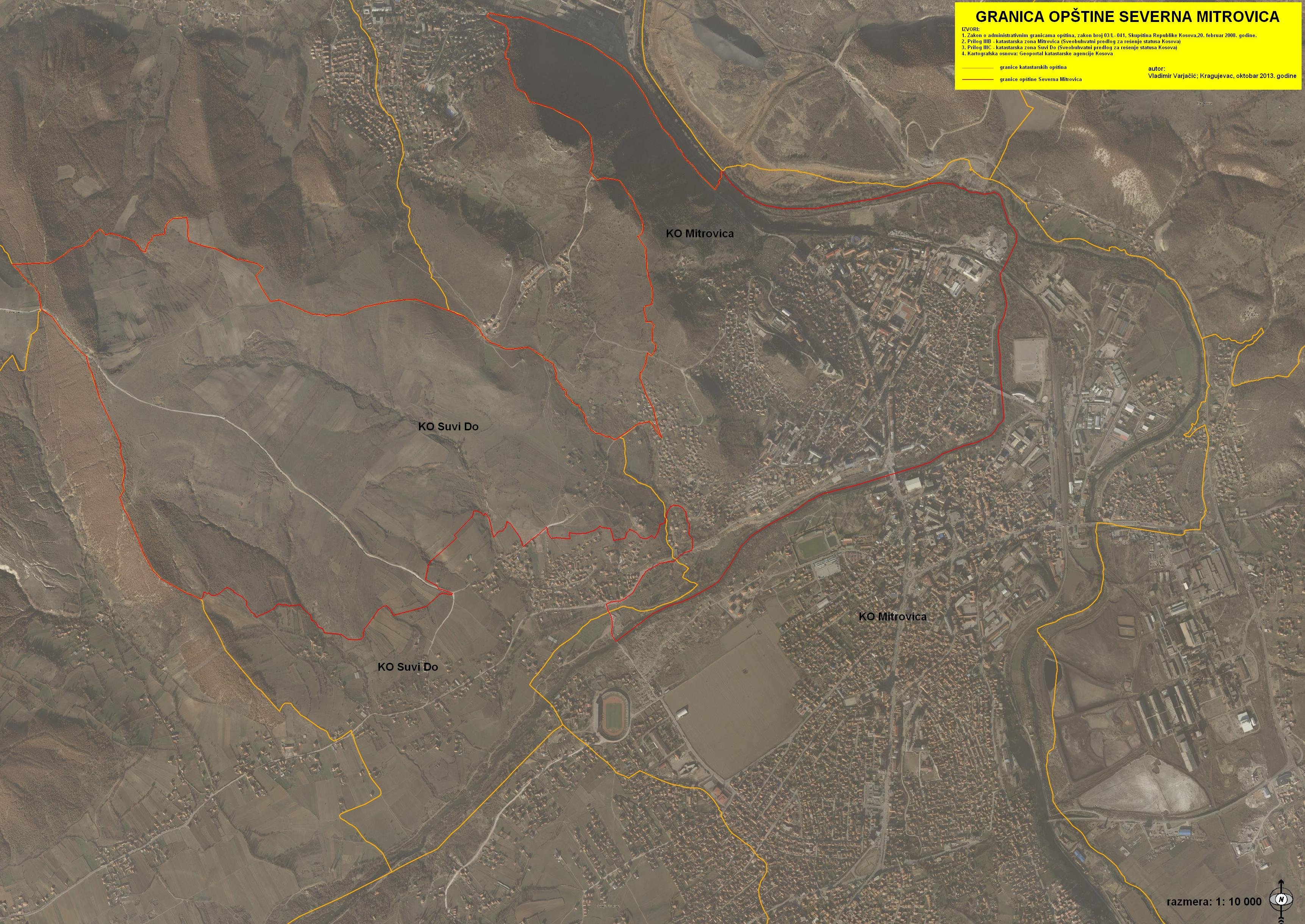 Granice opštine Severna Mitrovica